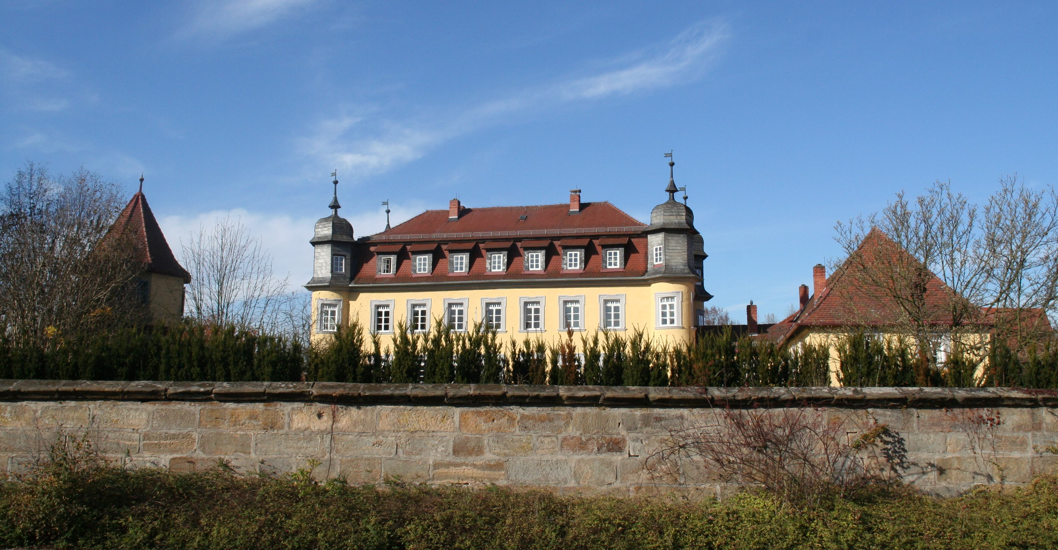 Neues Schloss in Küps in Oberfranken